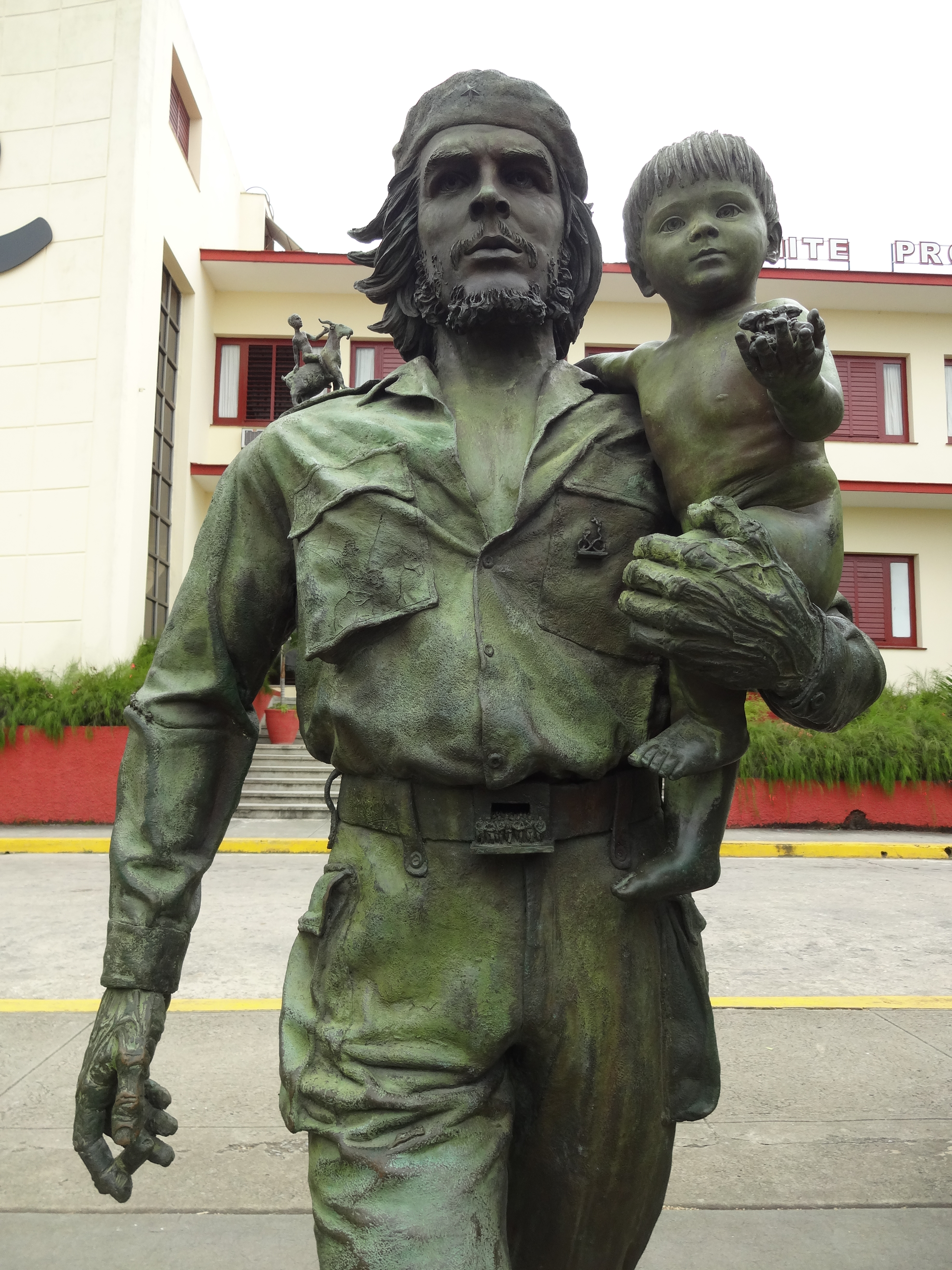 Statue Che con niño in Santa Clara (Kuba) vor dem Gebäude der Provinzregierung